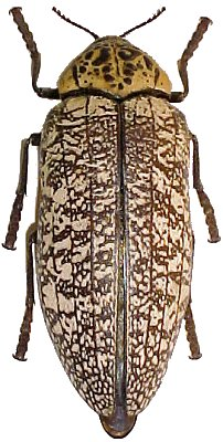 Aaata finchi